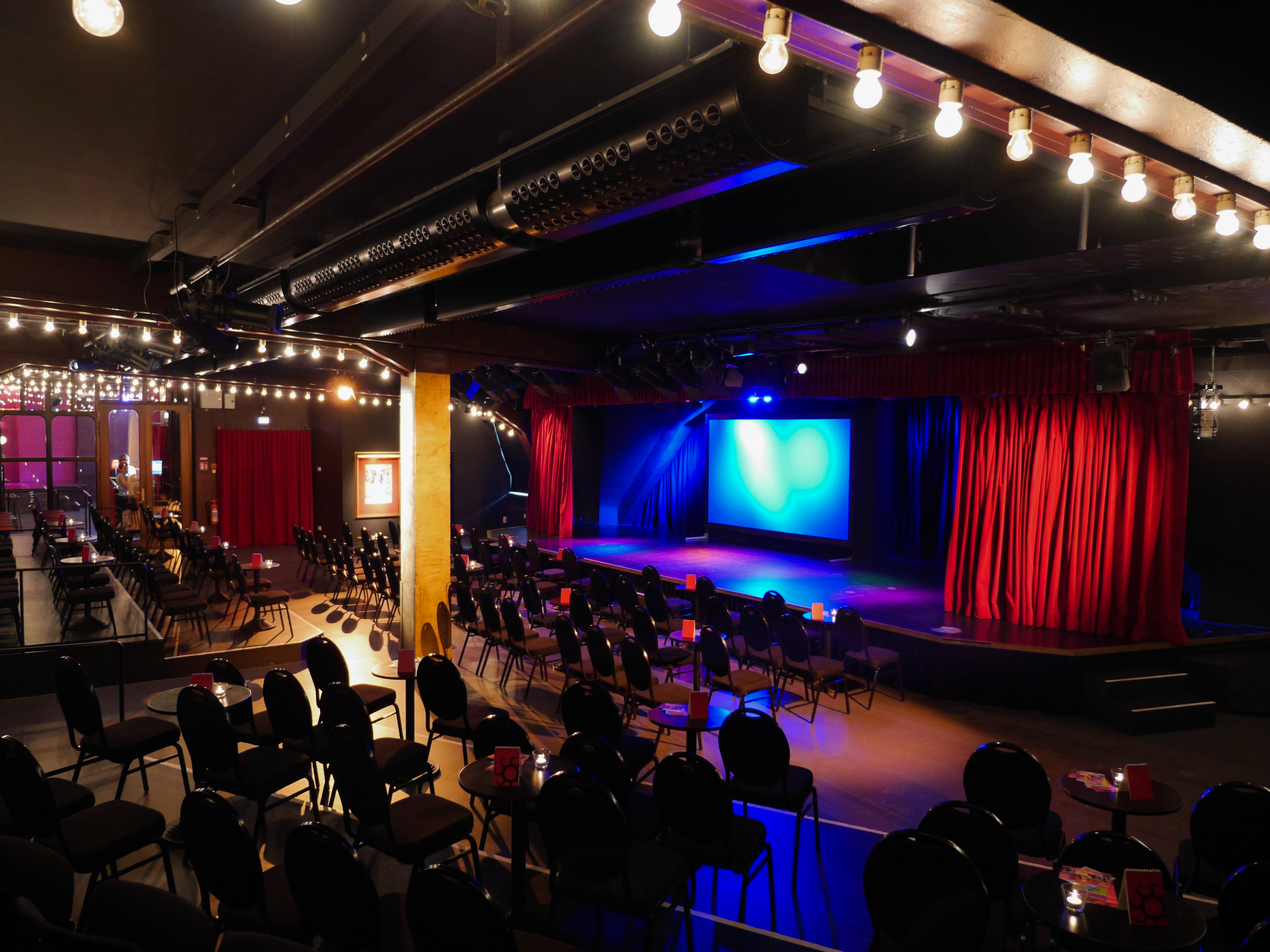 BKA Theater Bühne & Saal